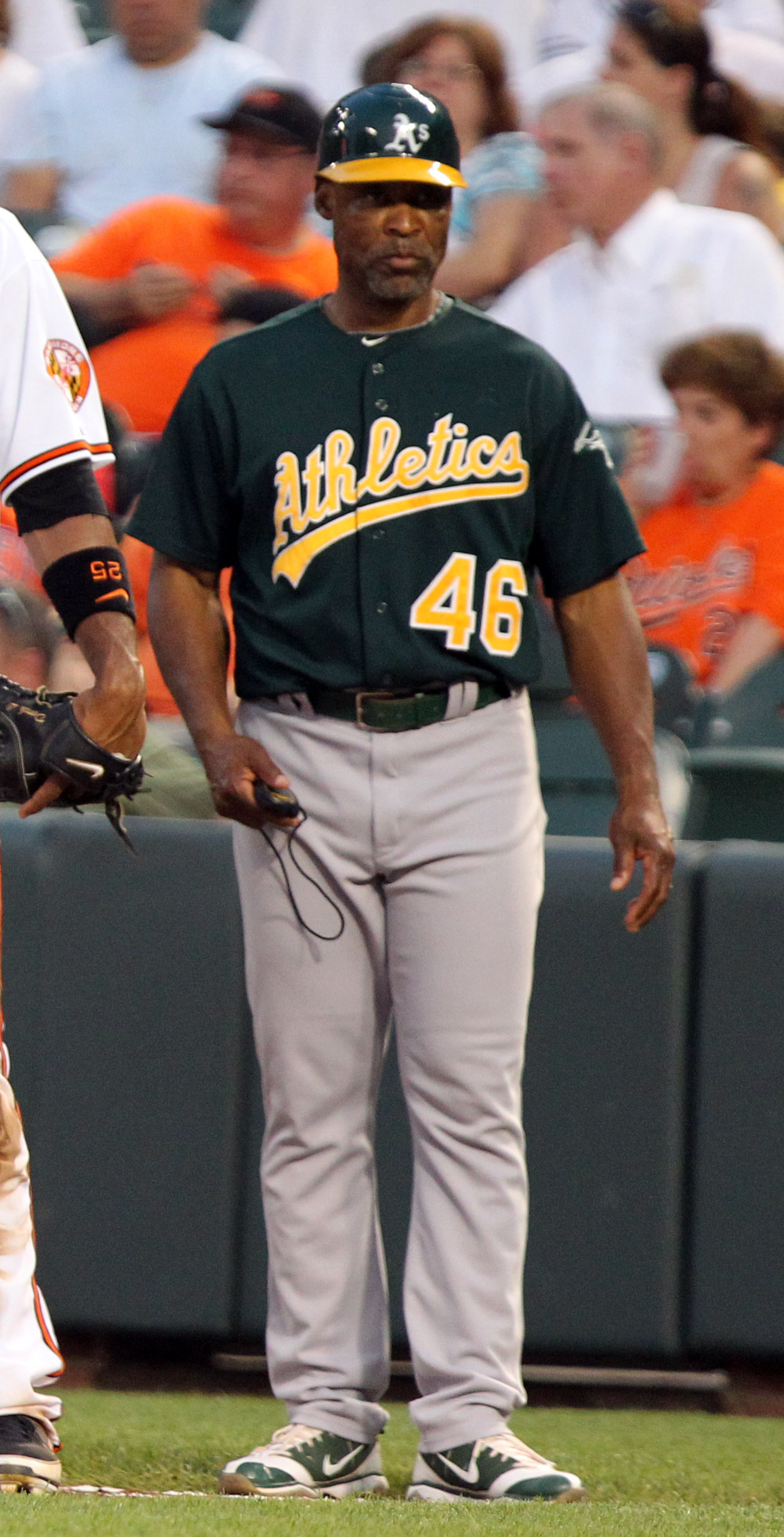 Tye Waller